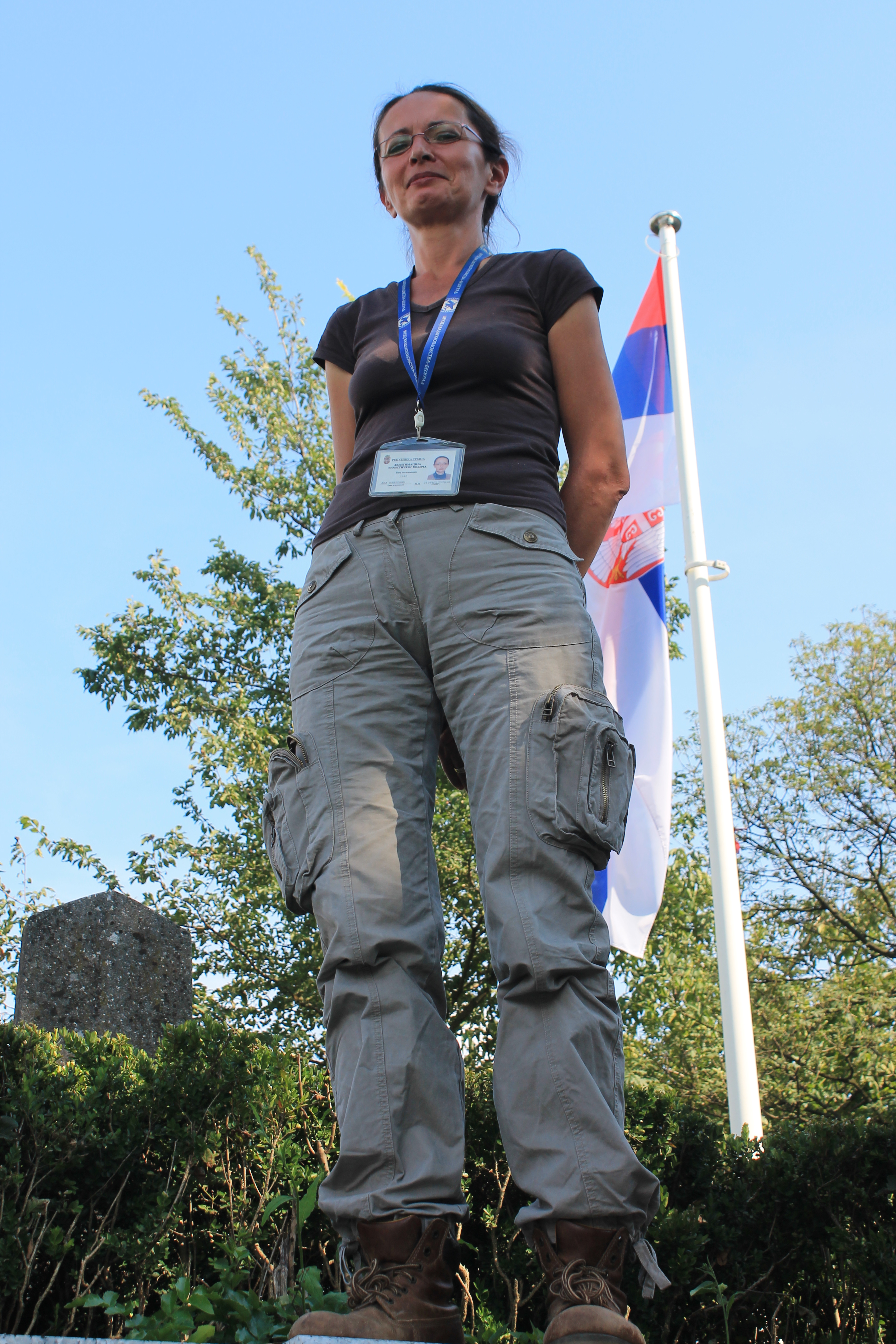 Cerski marš 2018